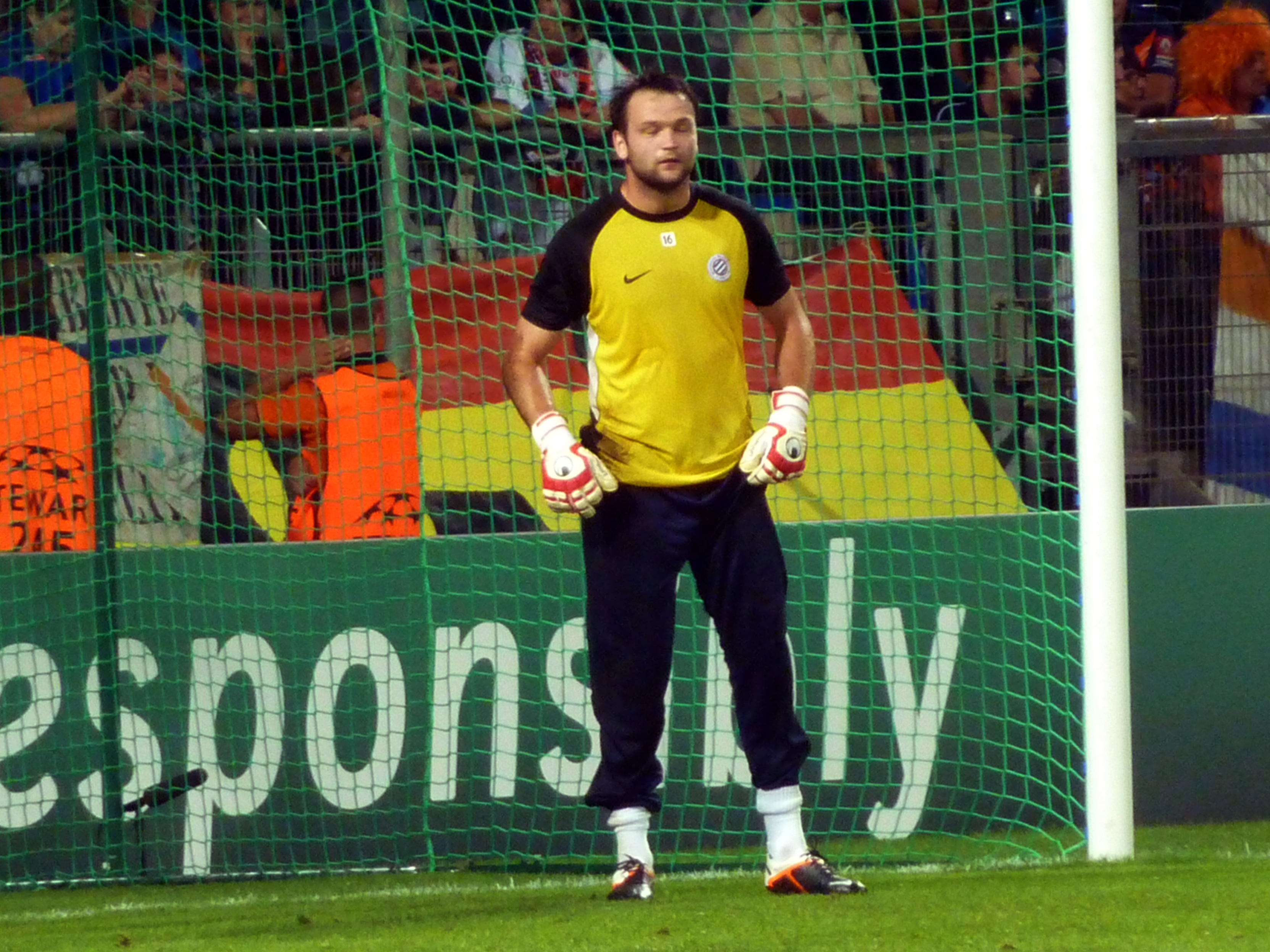 Geoffrey Jourdren lors du match MHSC - Arsenal (Ligue des Champions, Phase de poules, 1er match, 18/09/2012)